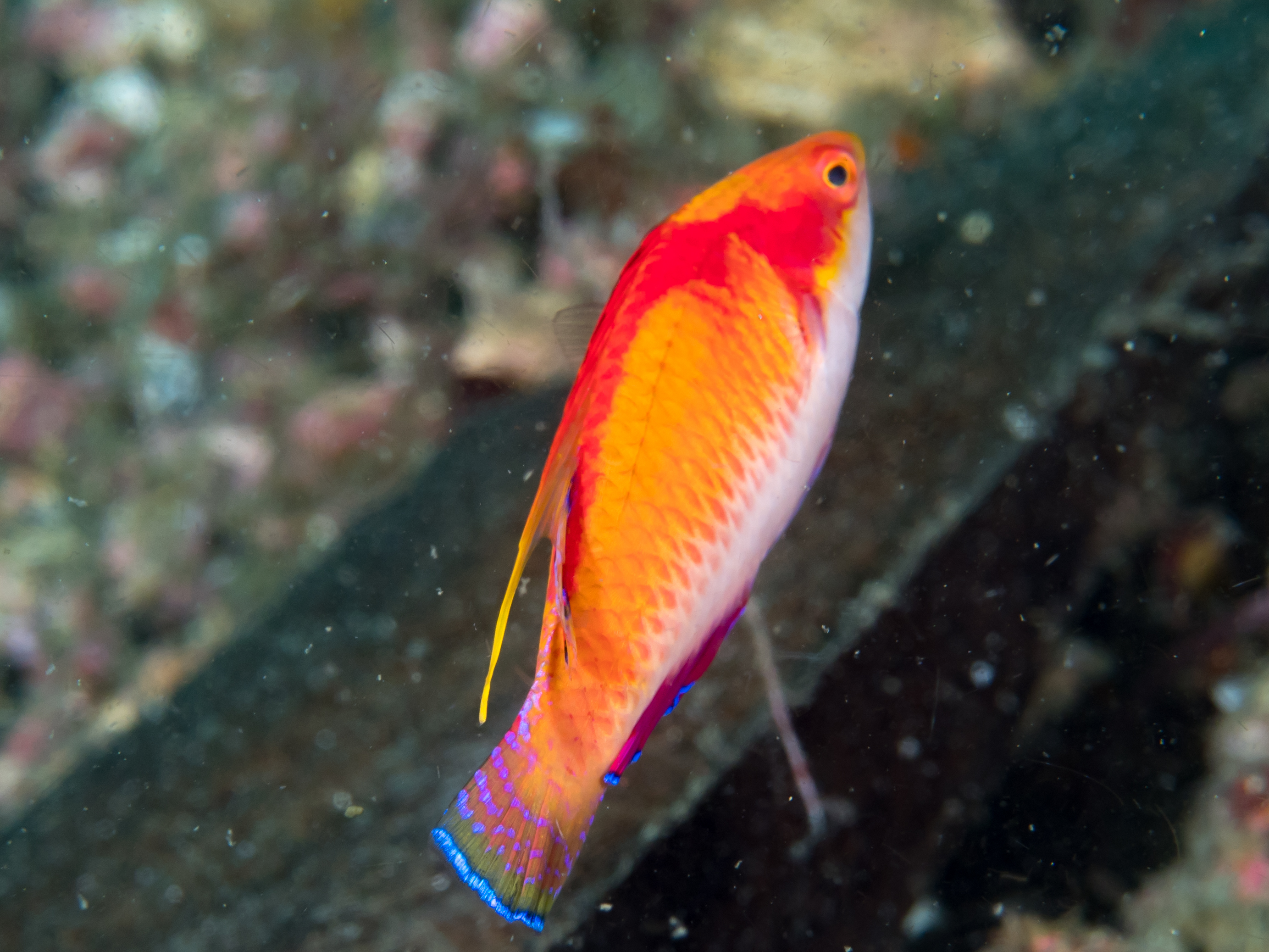 Lembeh, Indonesia - Tono's wrasse (Cirrhilabrus tonozukai)